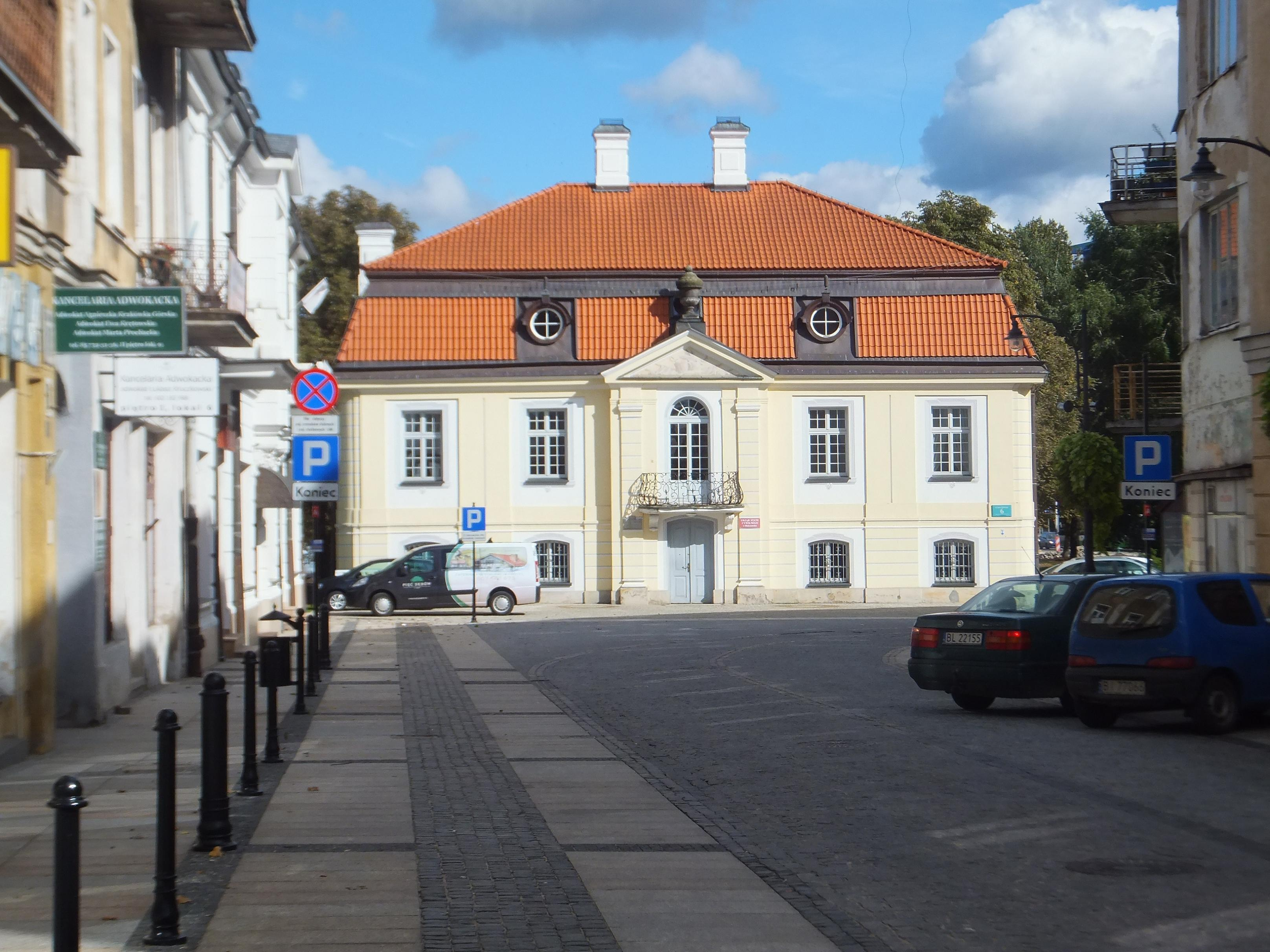 Białystok, pałacyk gościnny Branickich, 1771, 1947-1952